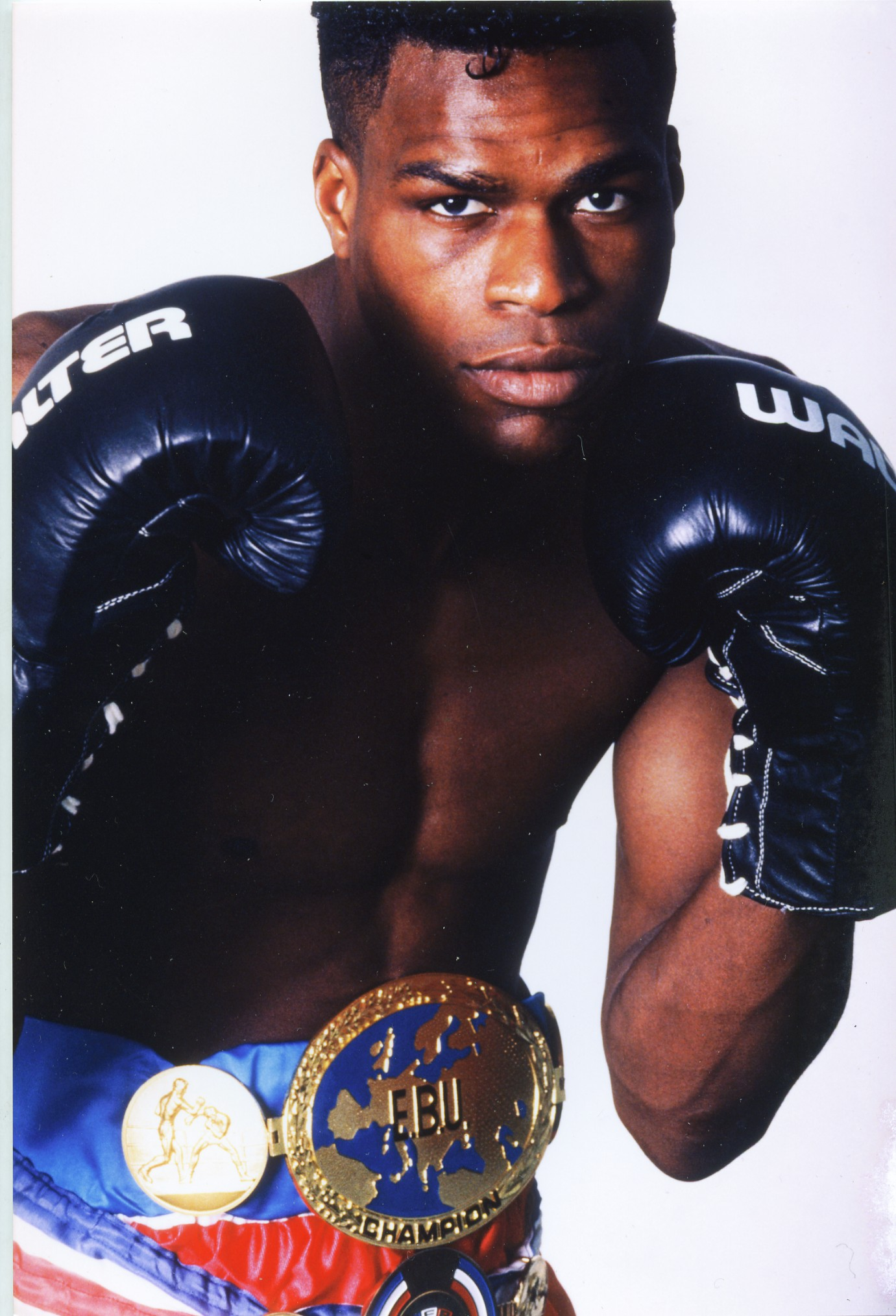 photo prise à l'entrainement